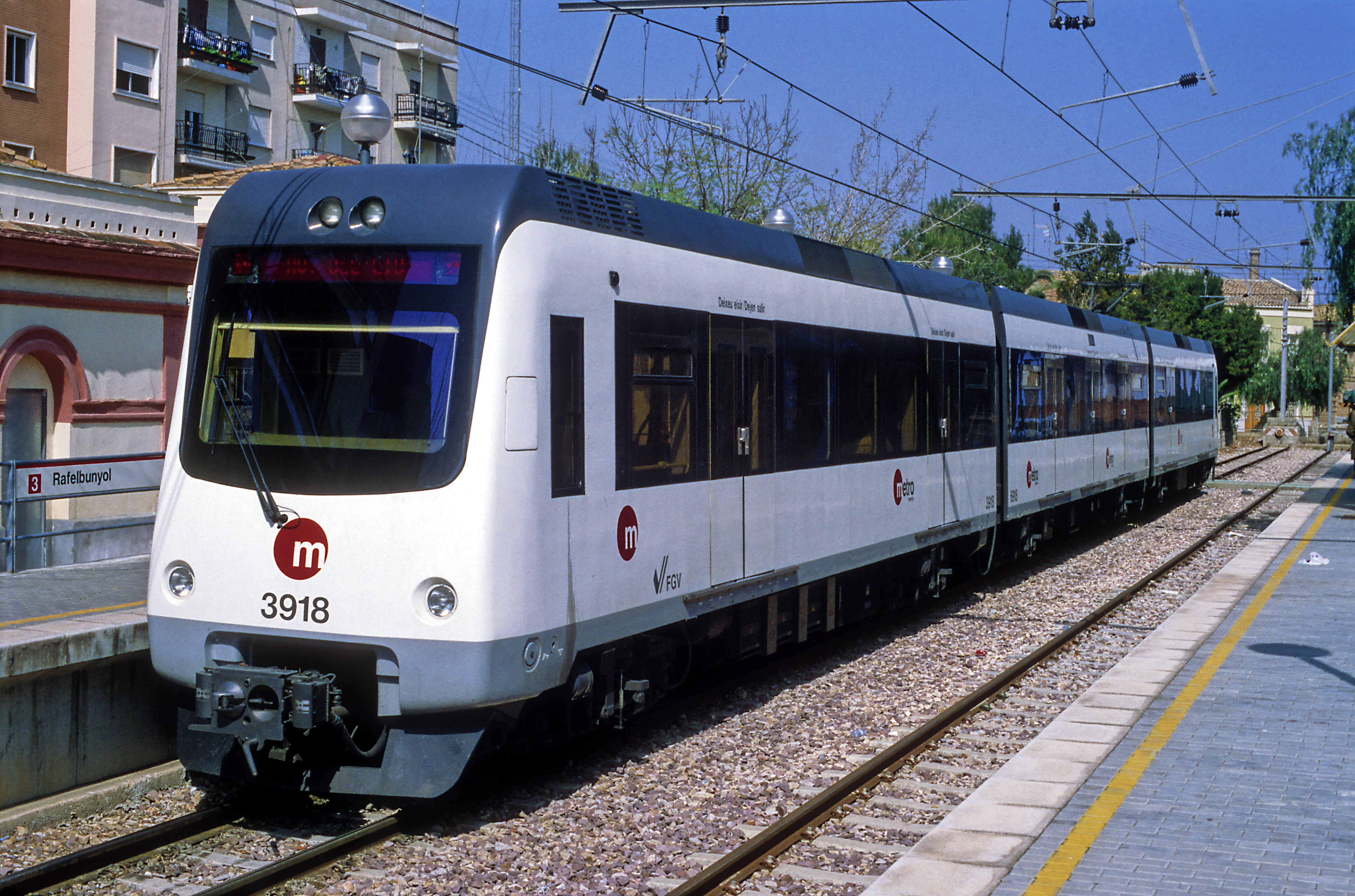 Endpunkt der U-Bahn-Linie 3, Wendehalt. Aus Platzgründen besteht in Rafelbuñol keine Kehranlage. Während der Fallas de Valencia im März 1999, die Linie 3 verkehrt zu diesem Zeitpunkt erst ein halbes Jahr bis zur Avenida del Cid. Die noch recht neuen Einheiten verkehren zum Aufnahmezeitpunkt mit nur einem Mittelwagen.